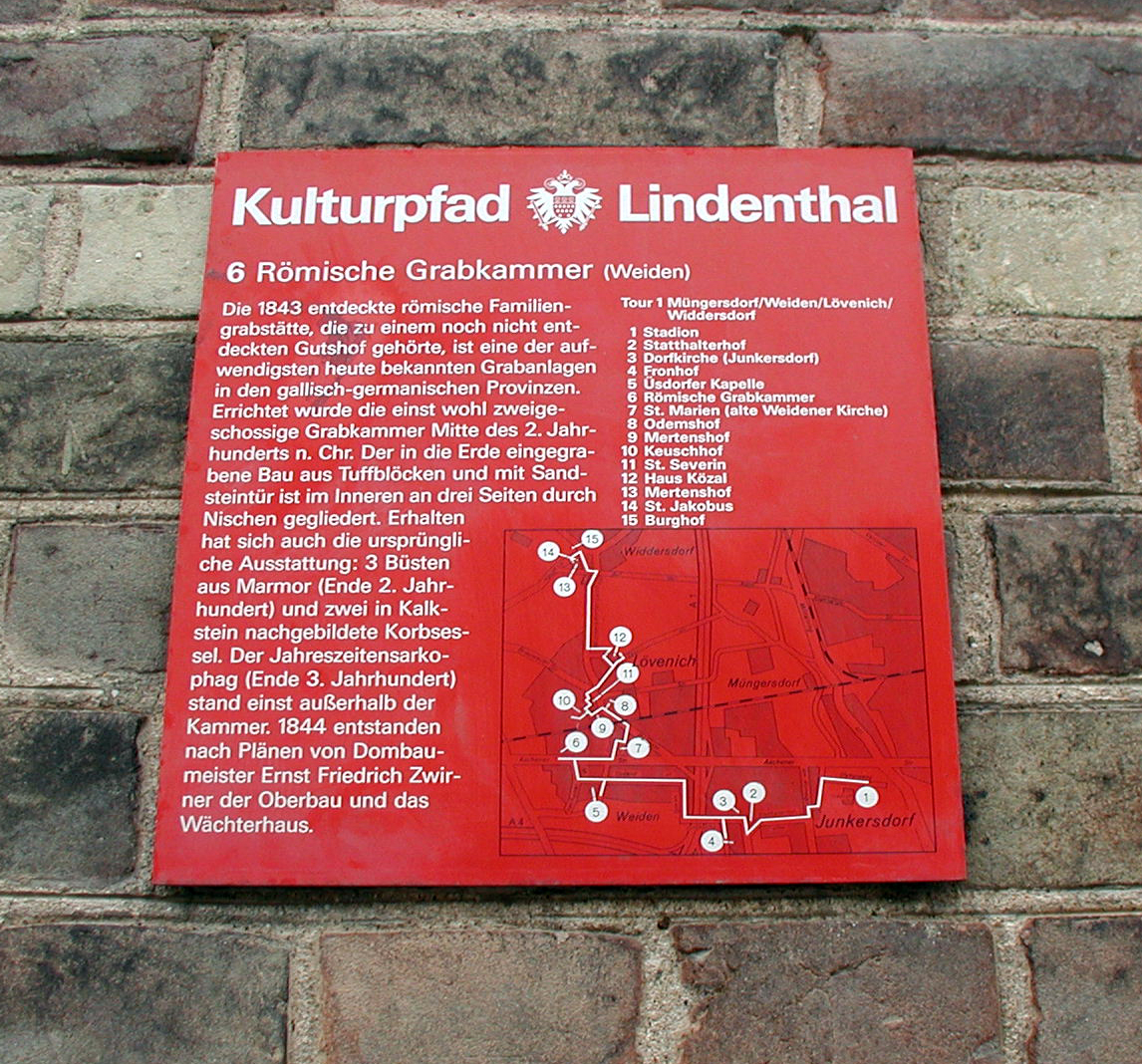 Köln-Weden-Römergrab, Info